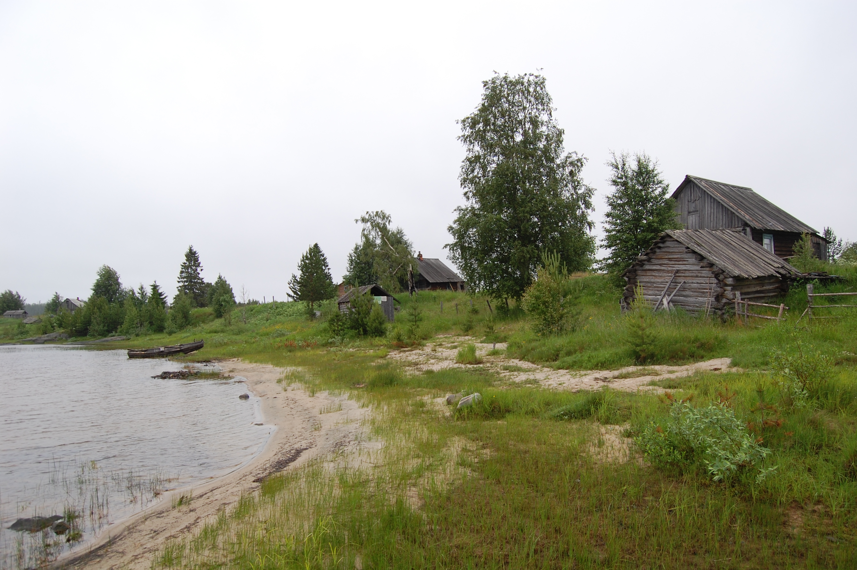 Haikola village in Karelia, Russia